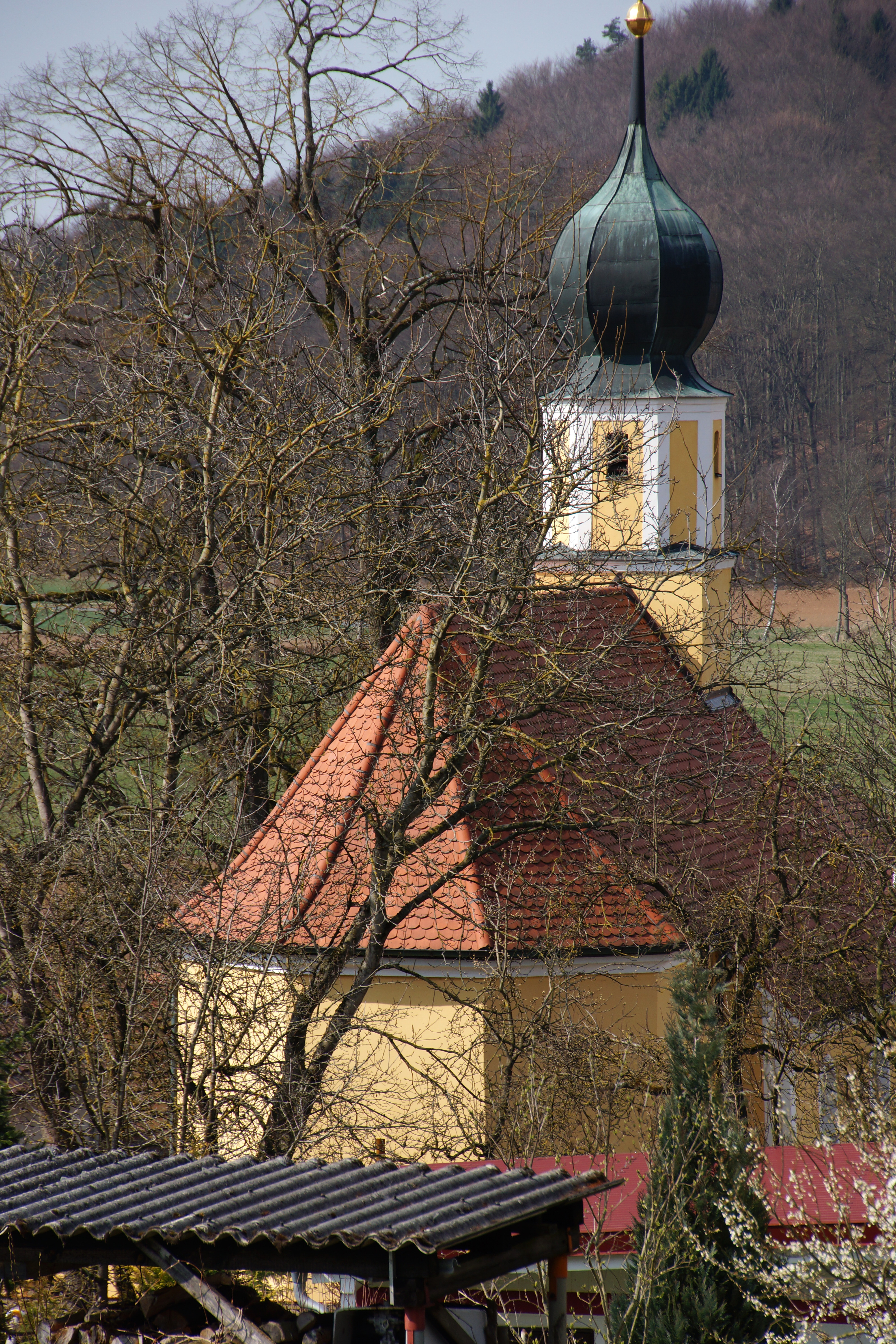 Die katholische Filialkirche St. Leonhard in Freudenricht bei Velburg